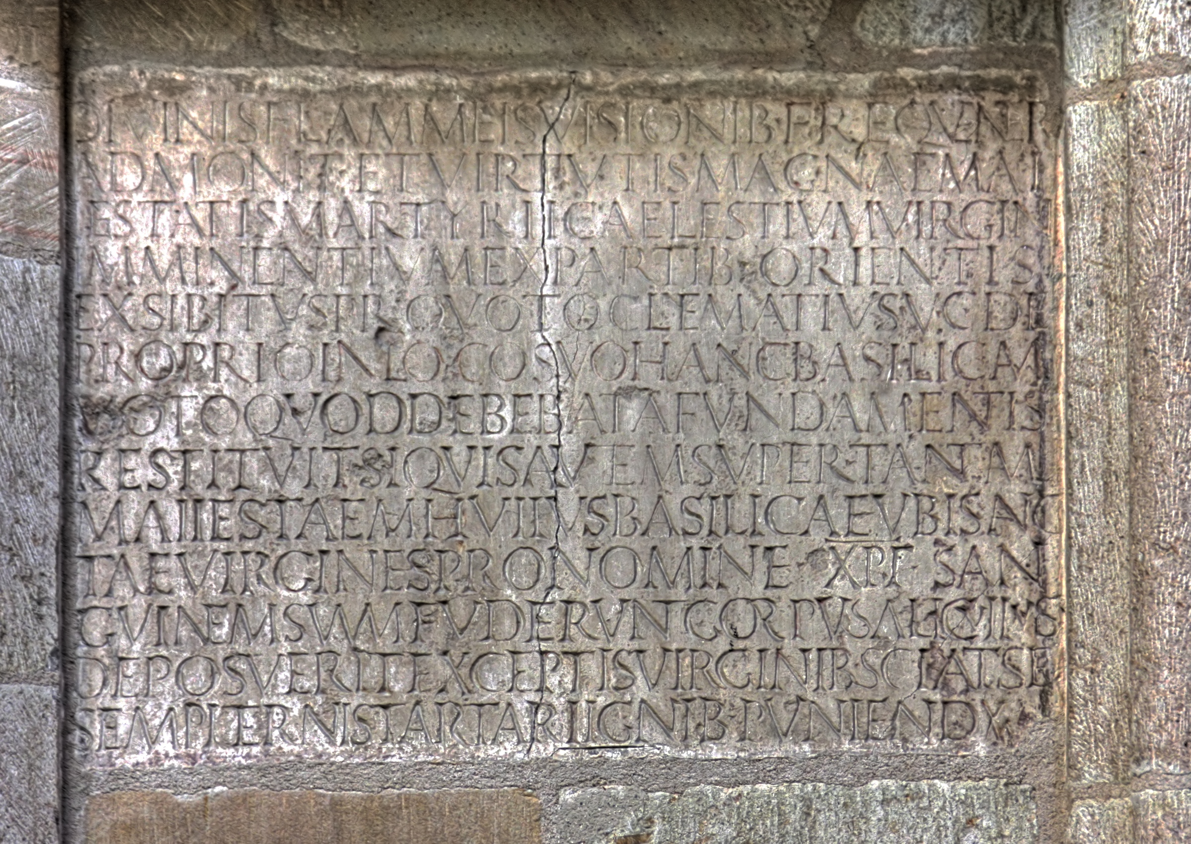 Clematius-Inschrift im Chorraum von St. Ursula, Köln (CIL XIII, *01313)